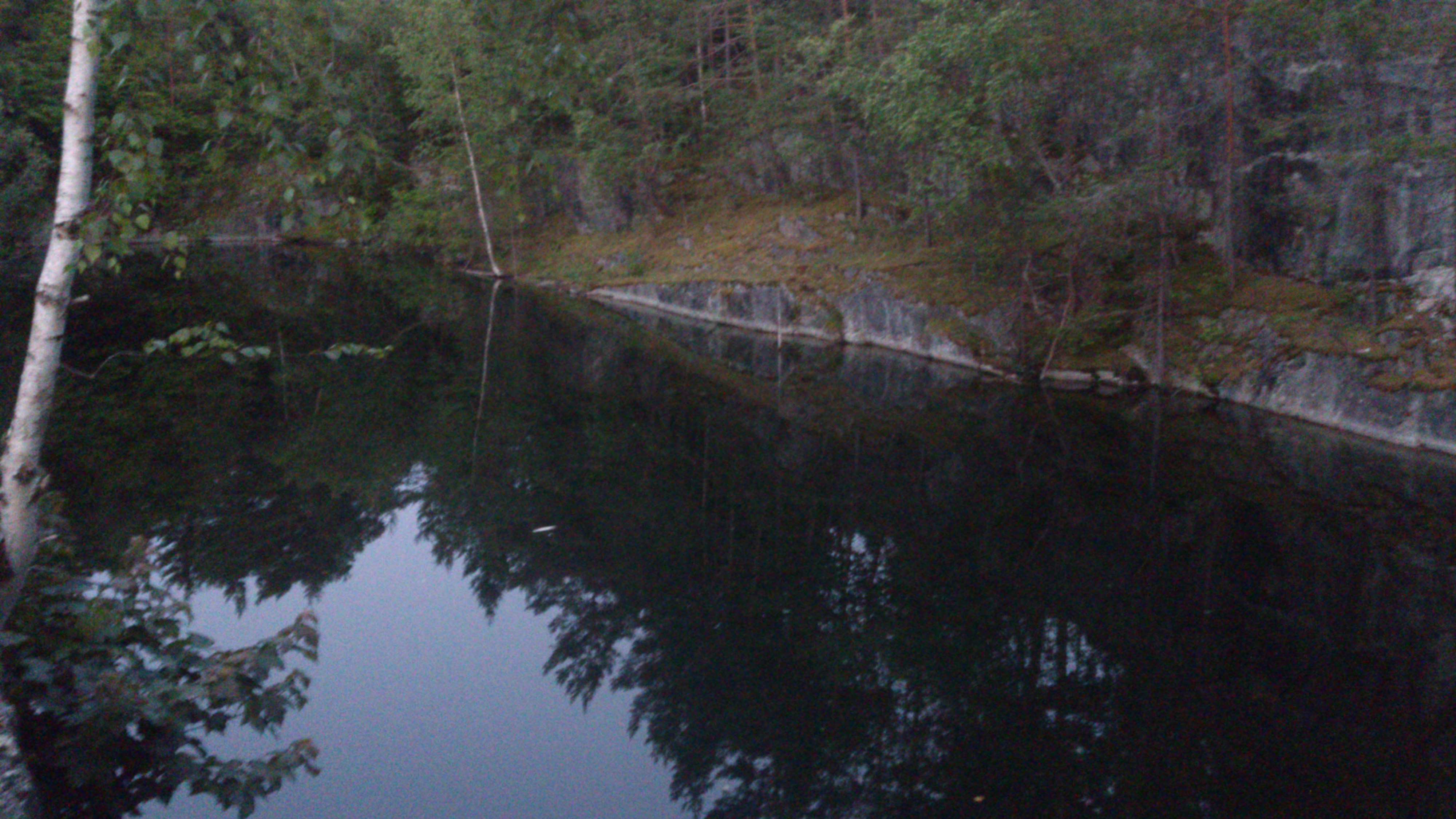 Stora brottet, Marmorbruket, Kolmården.